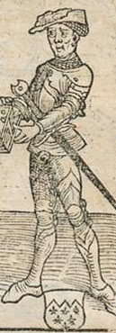 Dieter VI. von Dalberg. Vorlage: Widmungsbild aus Jakob Köbel: "Ain newe geordnet Rechenbüchlein ...", Oppenheim 1514.